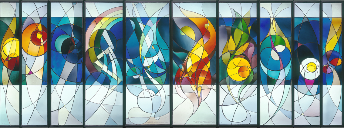 Römisch-katholische Pfarrkirche St. Andreas Uster, Glasfenster von Urs Rickenbach